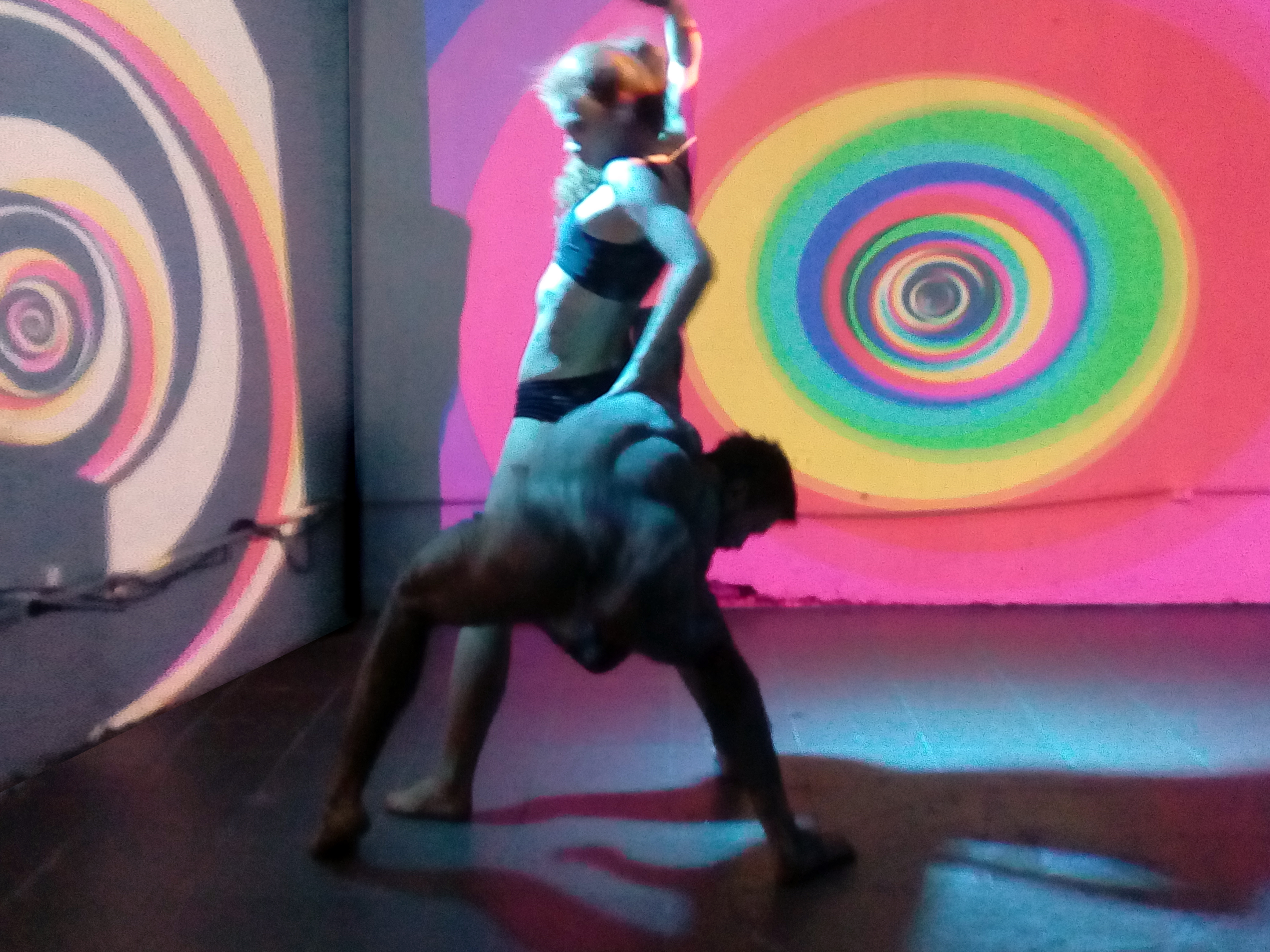 Перформанс "Камон, Лотреамон!"